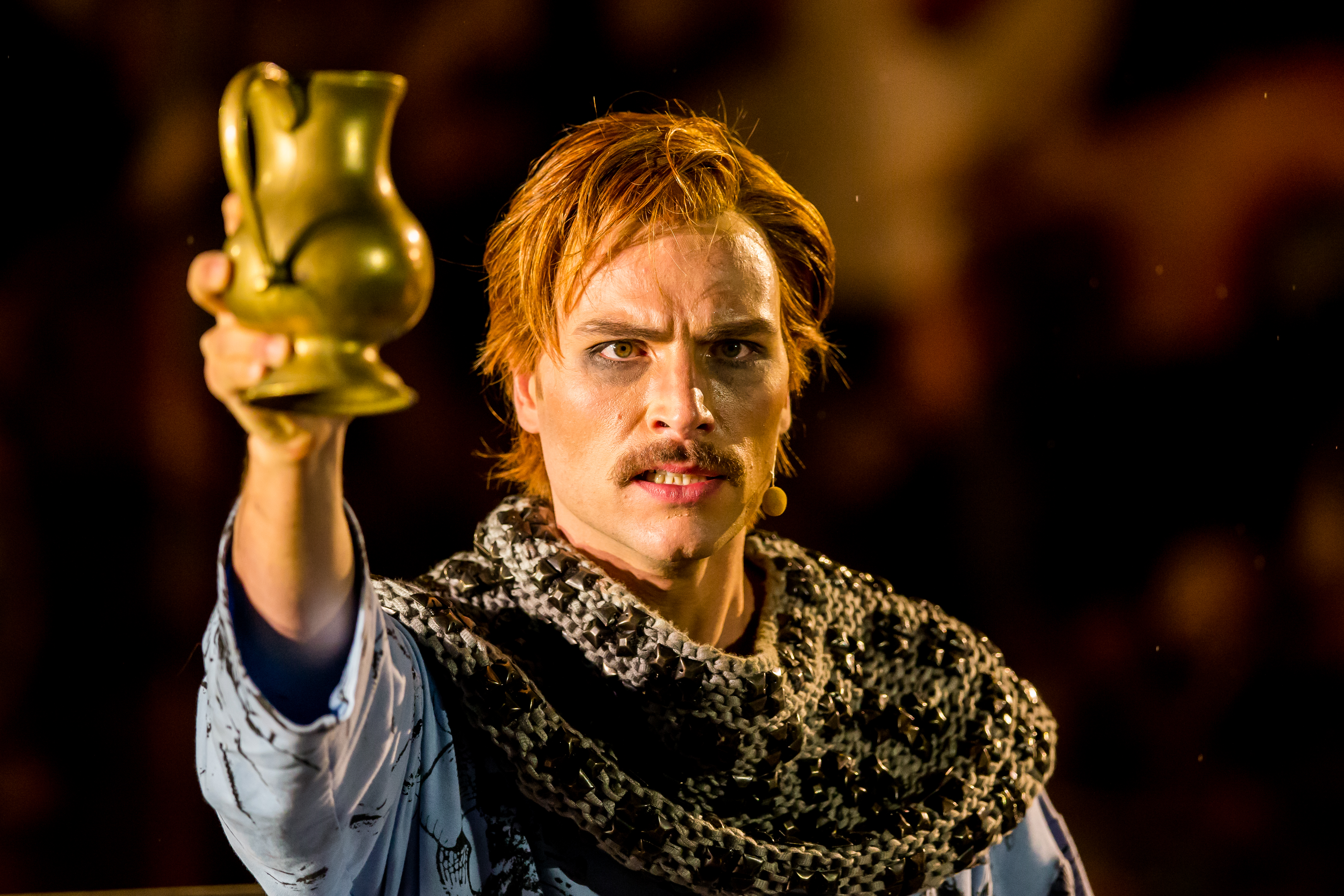 Nibelungenfestspiele Worms Gemetzel 2015 Nordseite Wormser Kaiserdom Nico Hofmann (Intendant), Albert Ostermaier (Autor), Thomas Schadt (Regisseuer) Enemble: Alina Levshin (Ortlieb), Maik Solbach (Narr), Judith Rosmair (Kriemhild), Catrin Striebeck (Brünhild), Markus Boysen (Etzel), Heiko Pinkowski (Dietrich), Max Urlacher (Hagen), Holger Kunkel (Gunter), Gabriel Raab (Gernot), Peter Becker (Giselher), Tom Radisch (Volker), Marion Breckwoldt (Zofe), Radu Cojocariu (Erzähler)